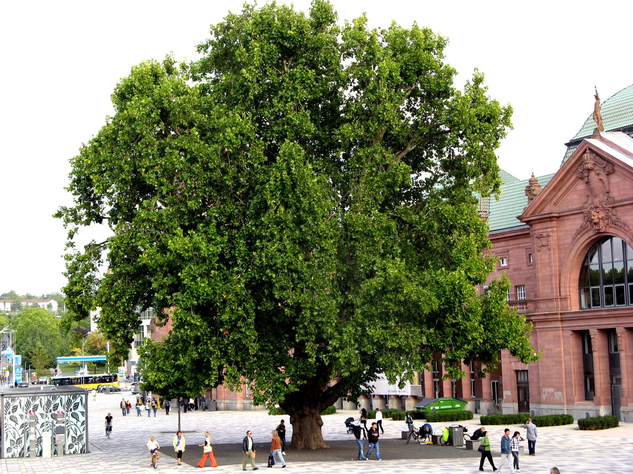 ca. 100-jährige Platane vor dem Wiesbadener Hauptbahnhof